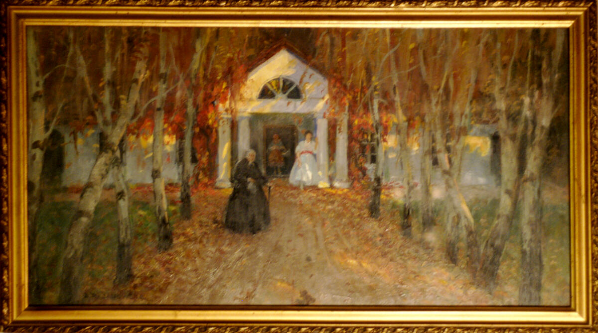 Bronisława Rychter-Janowska, Przed dworem, olej, ok. 1920 r. (własność prywatna)